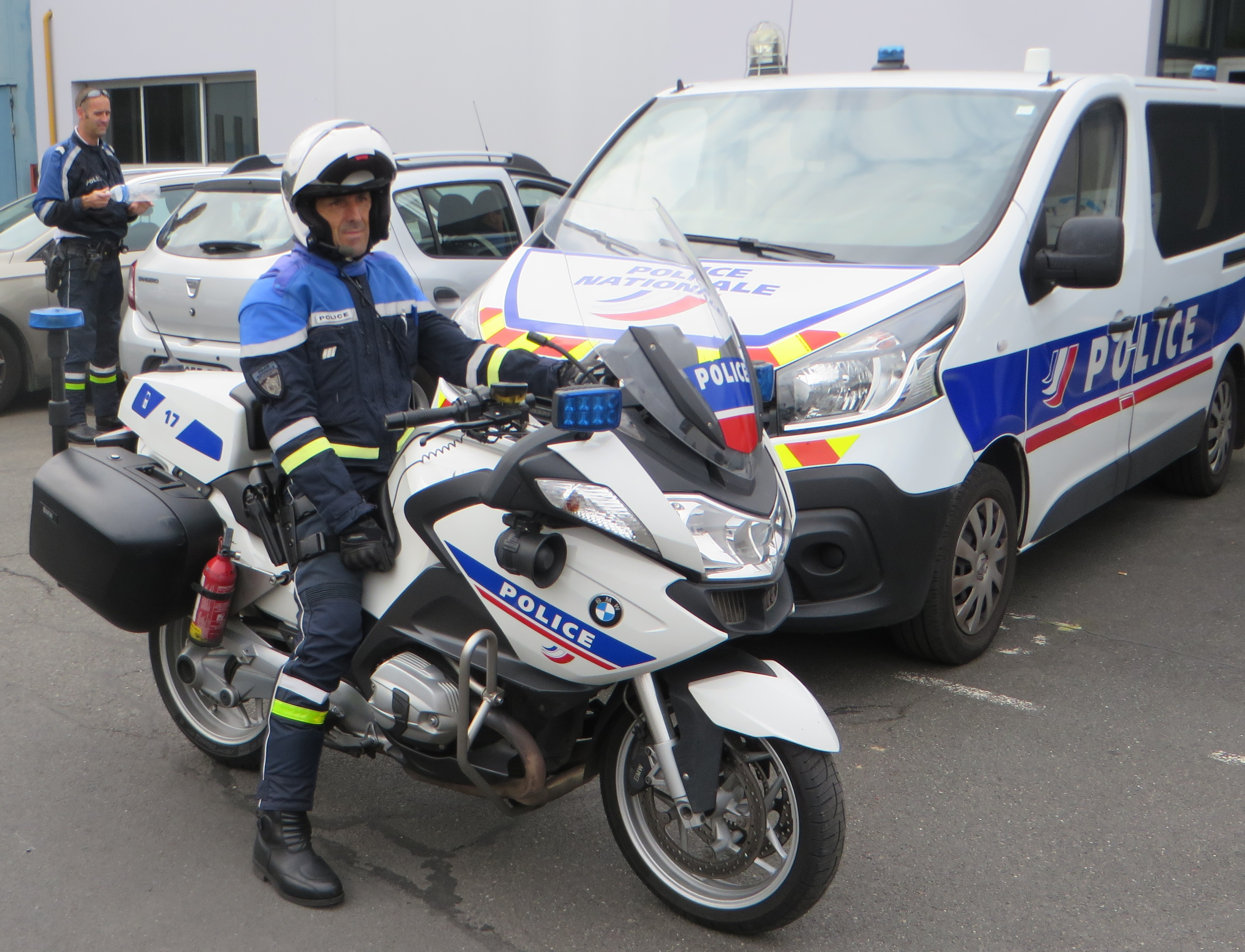 Franse politie (Police Nationale)